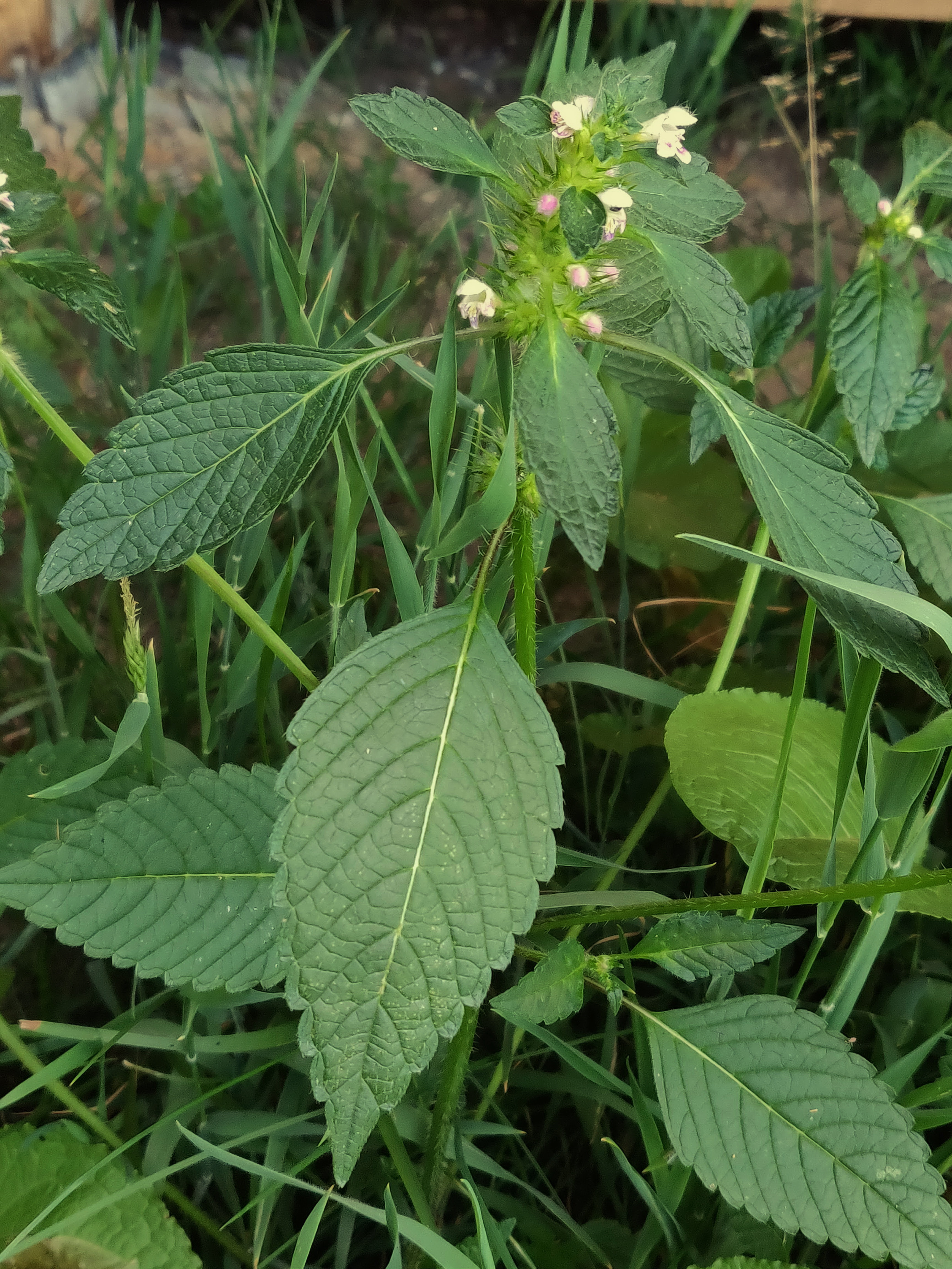 Galeopsis tetrahit L., Rude Skov, Denmark, 30 June 2018